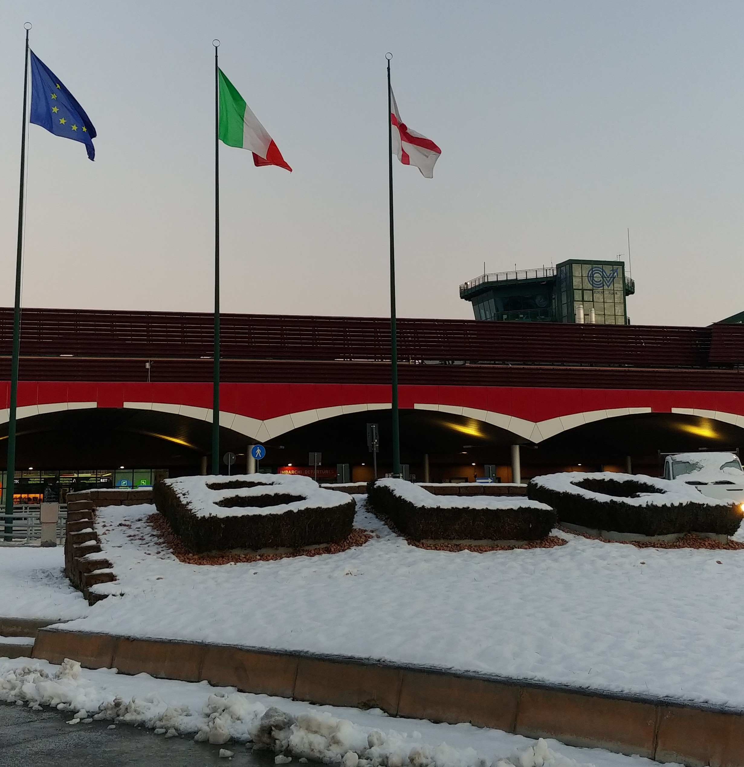 Visuale Terminal passeggeri piano superiore